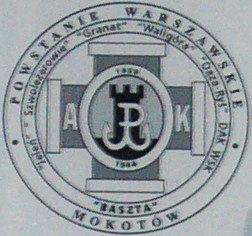 Odznaka zgrupowania pulku AK Baszta (z tablicy pamiatkowej przy ul. Dabrowskiego(Szustra)